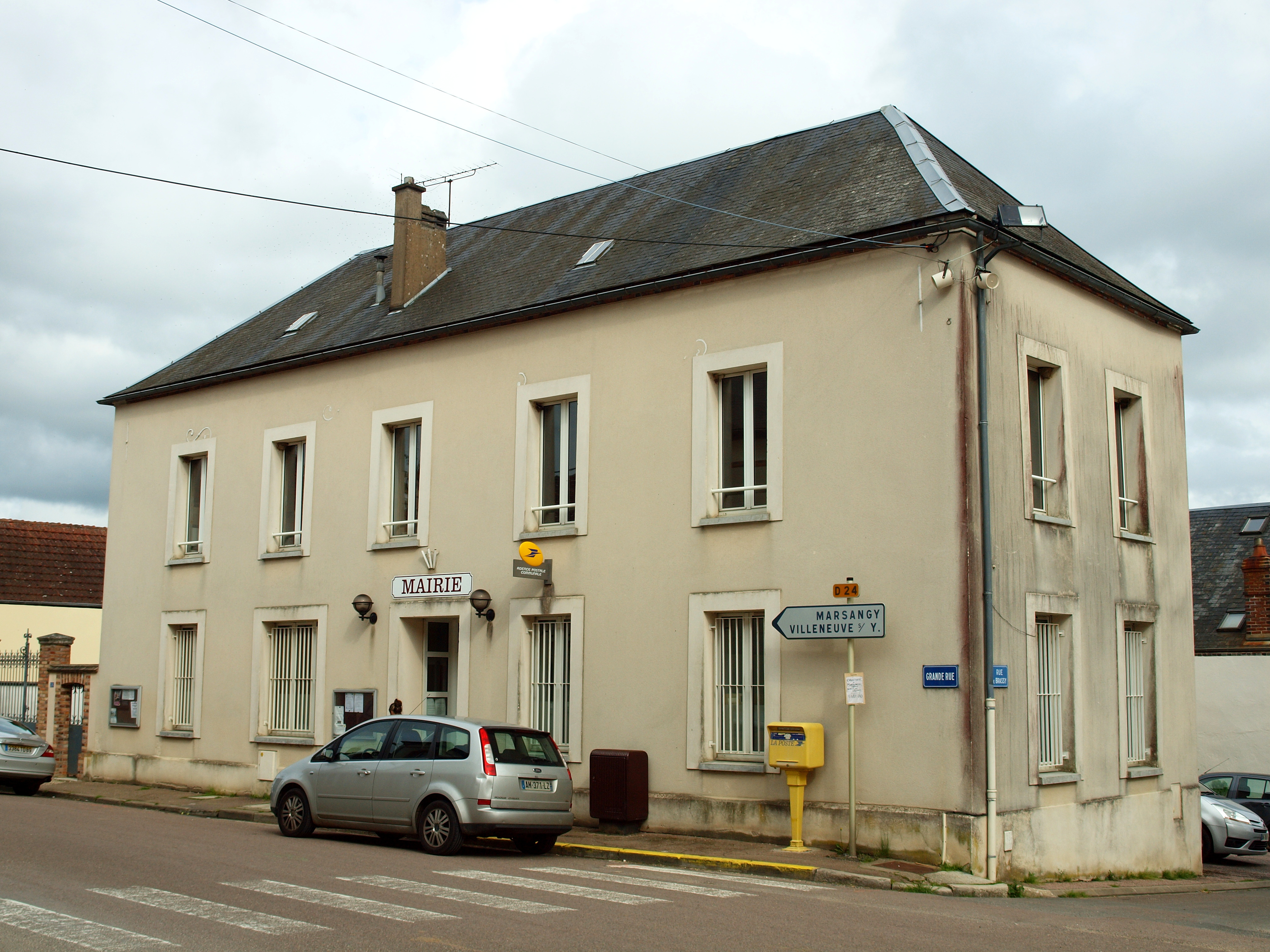 Égriselles-le-Bocage (Yonne, France)